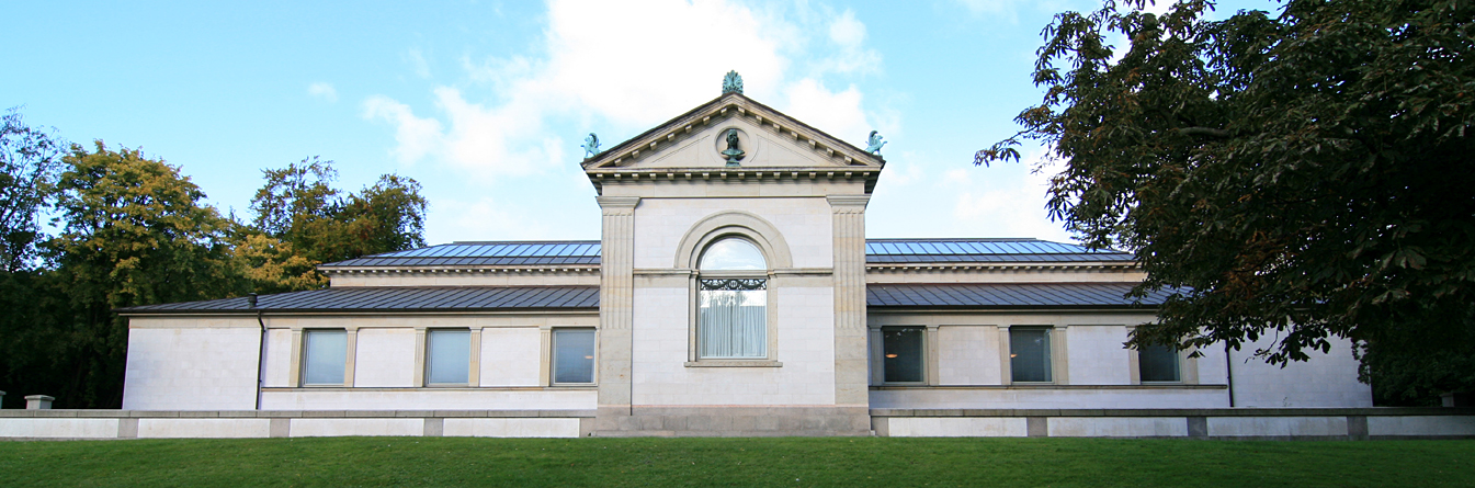 Den Hirschsprungske Samling, Østerbro, København. Facade mot Østre Anlæg.